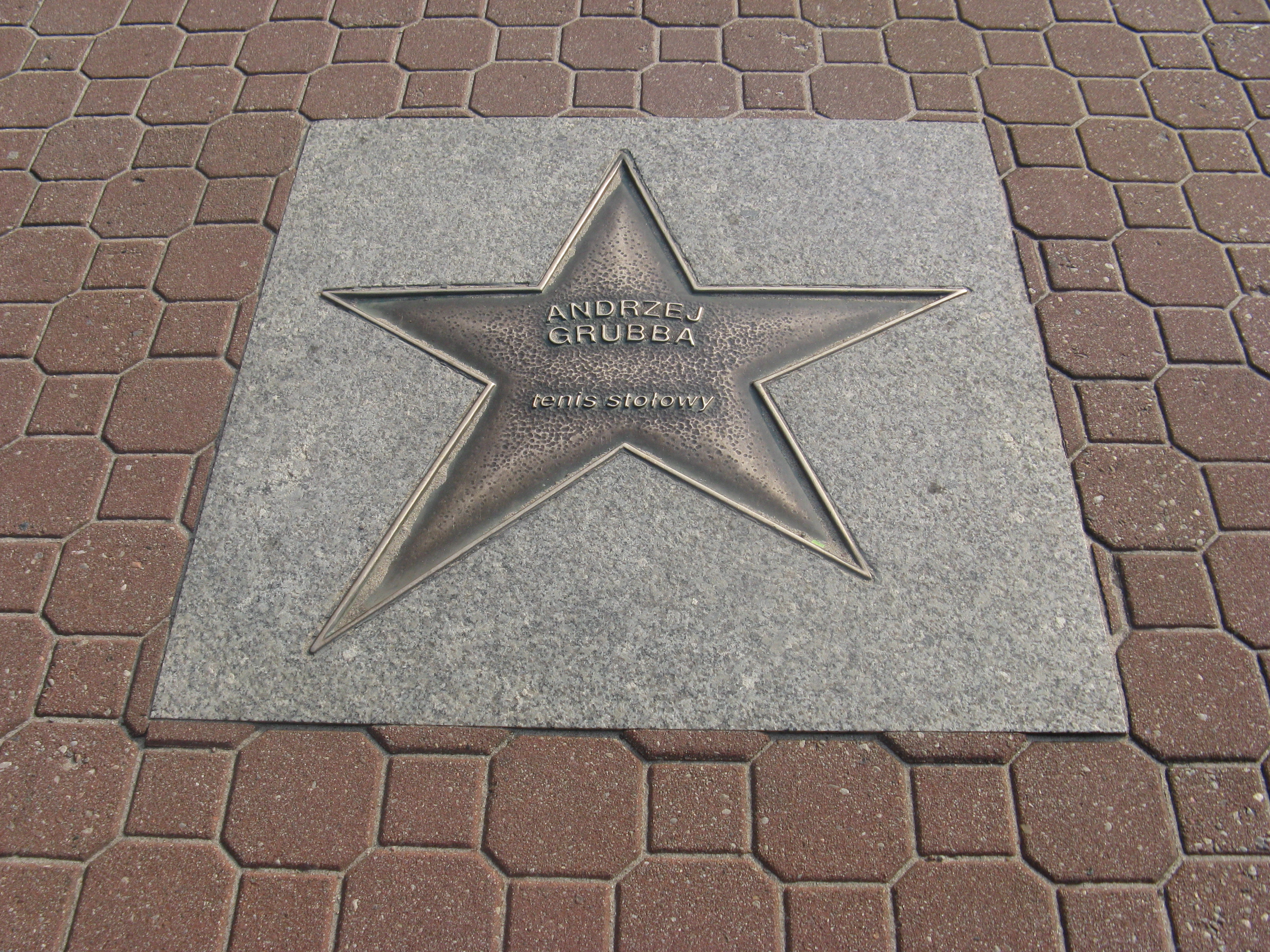 Aleja Gwiazd Sportu we Władysławowie